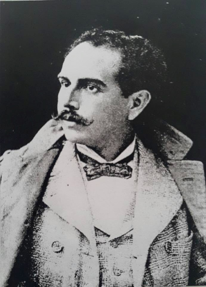 Fotógrafo Alberto G. Valdeavellano